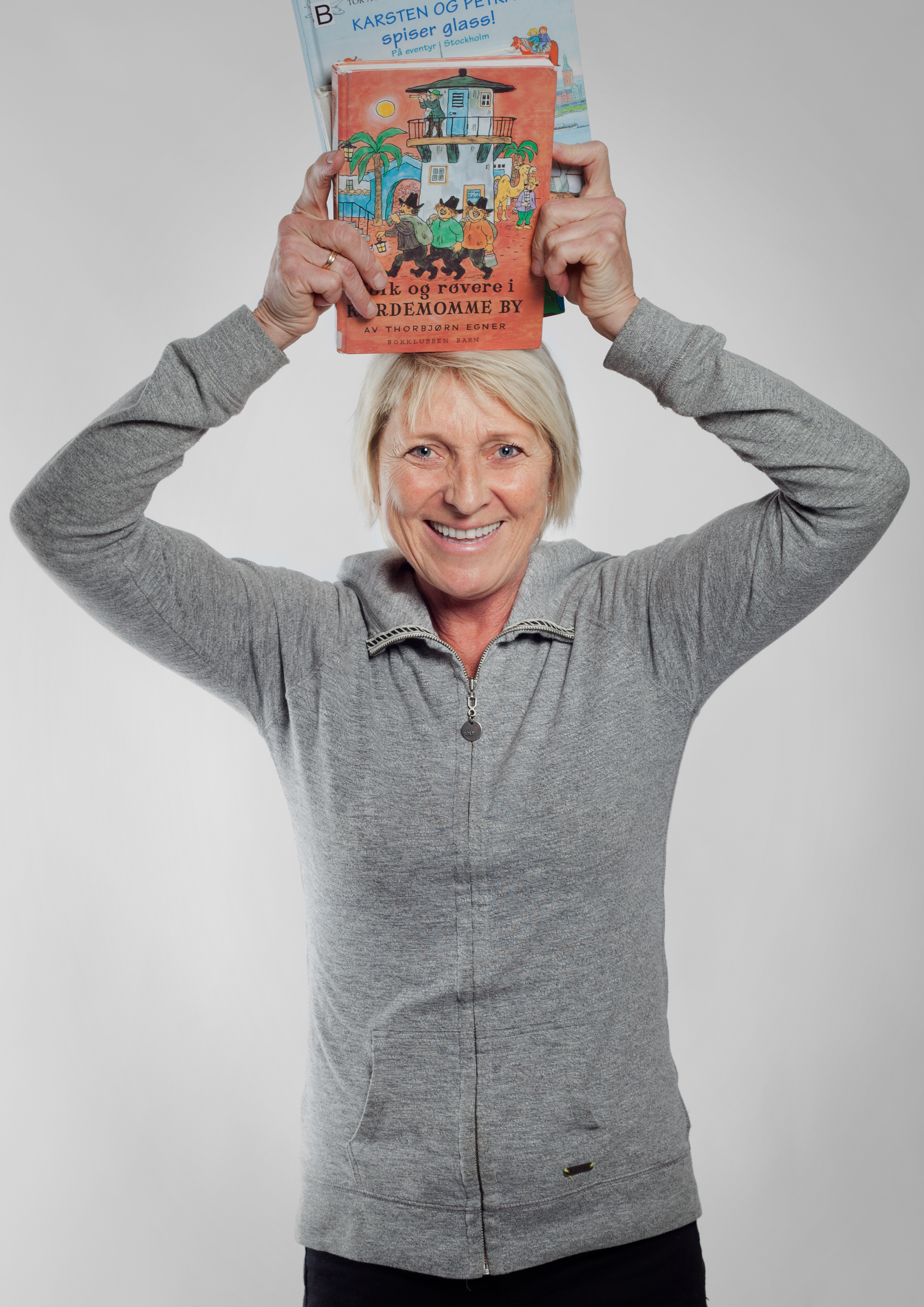 Håndballtrener Marit Breivik. Bildet er tatt i forbindelse med Nord-Trøndelag fylkesbiblioteks kampanje "Leseambassadører"